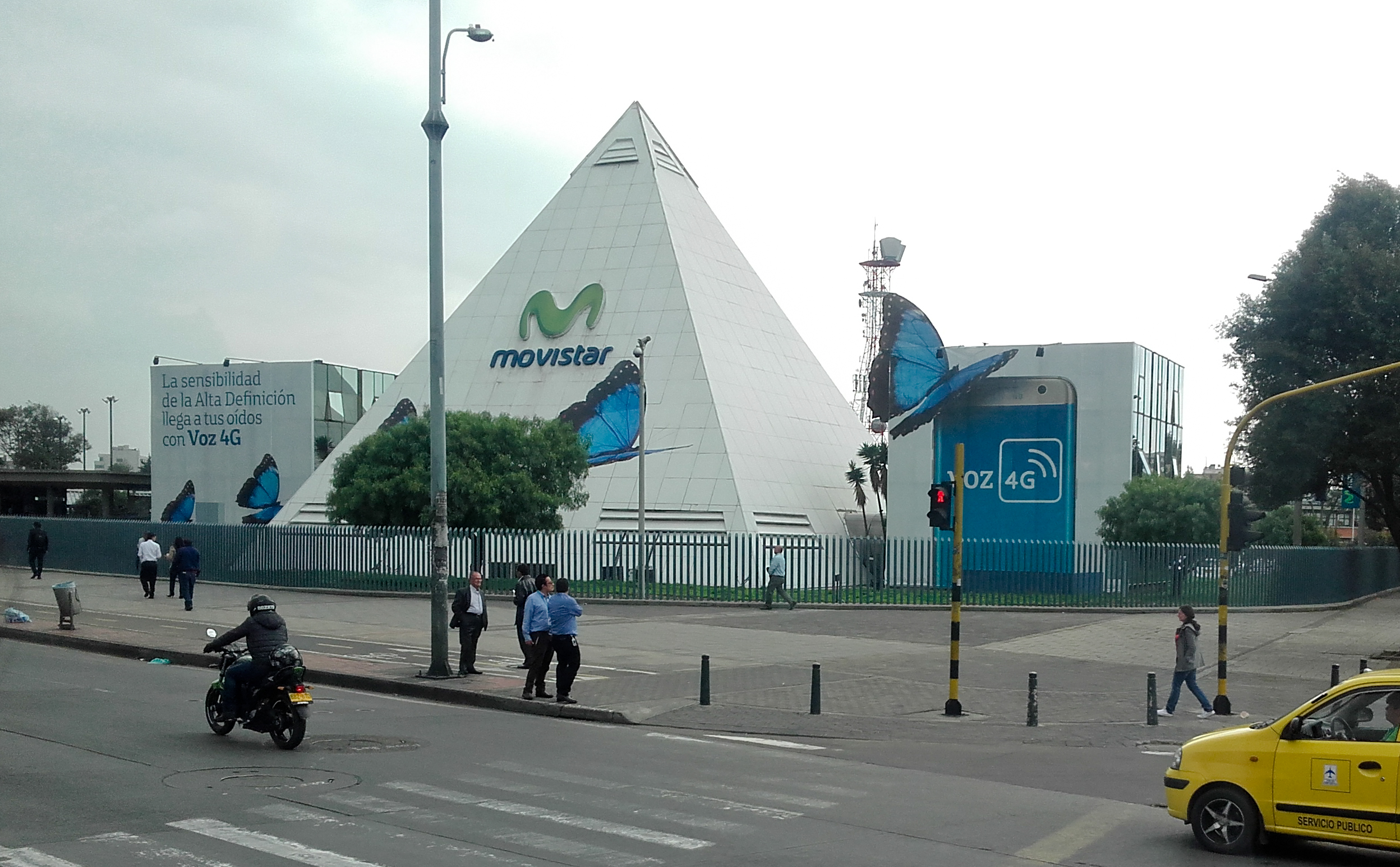 mfcvmccmncmcmcmf